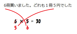 文章題におけるかけ算の順序は、見た順ではない